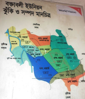 বক্তাবলী ইউনিয়ন ম্যাপ